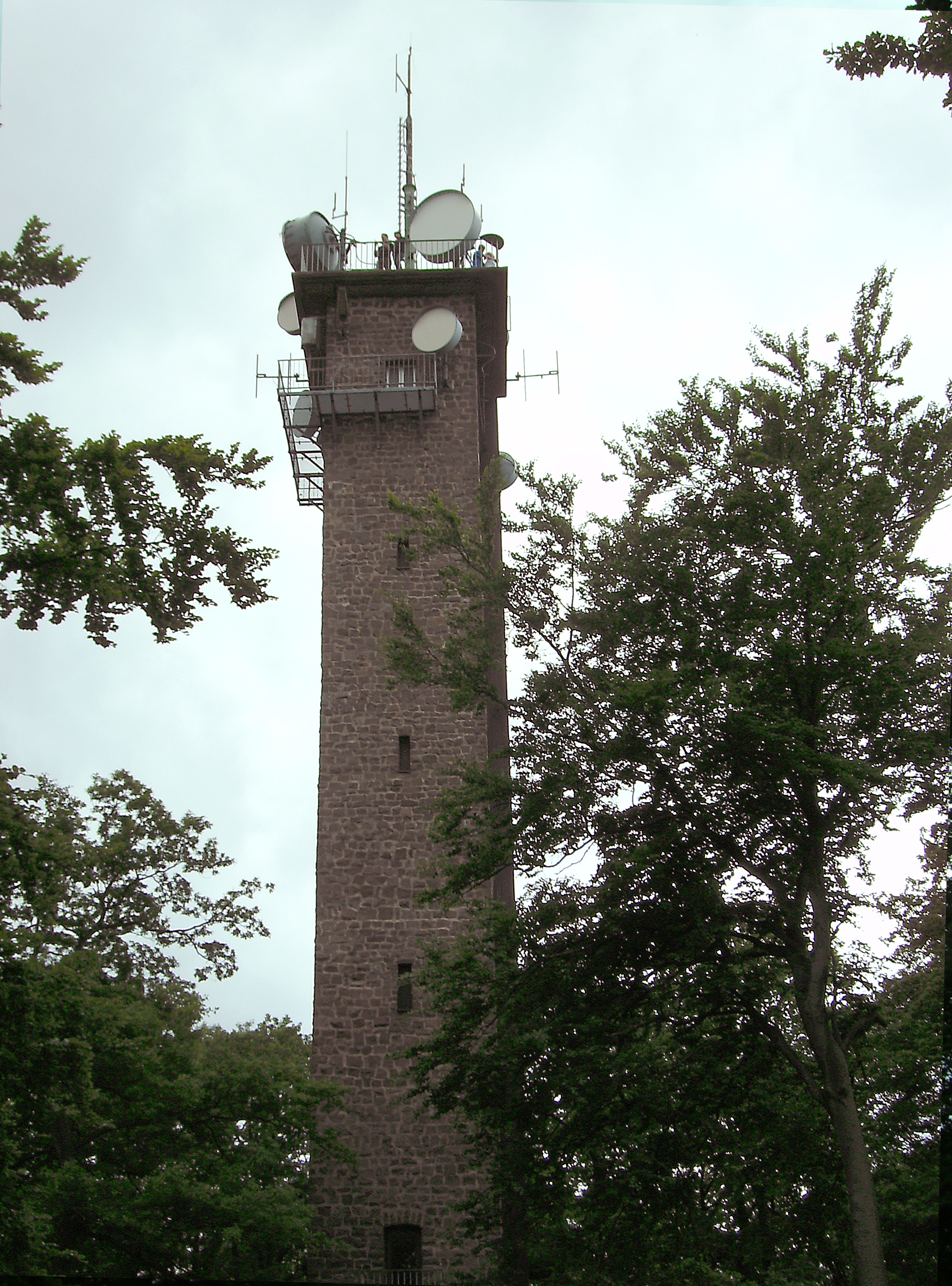 Potzberg: Post- und Aussichtsturm